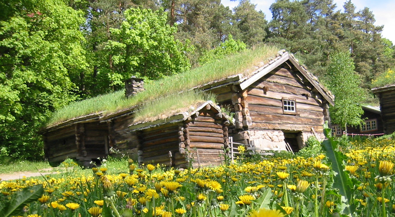 Norwegian Folk Museum, Oslo